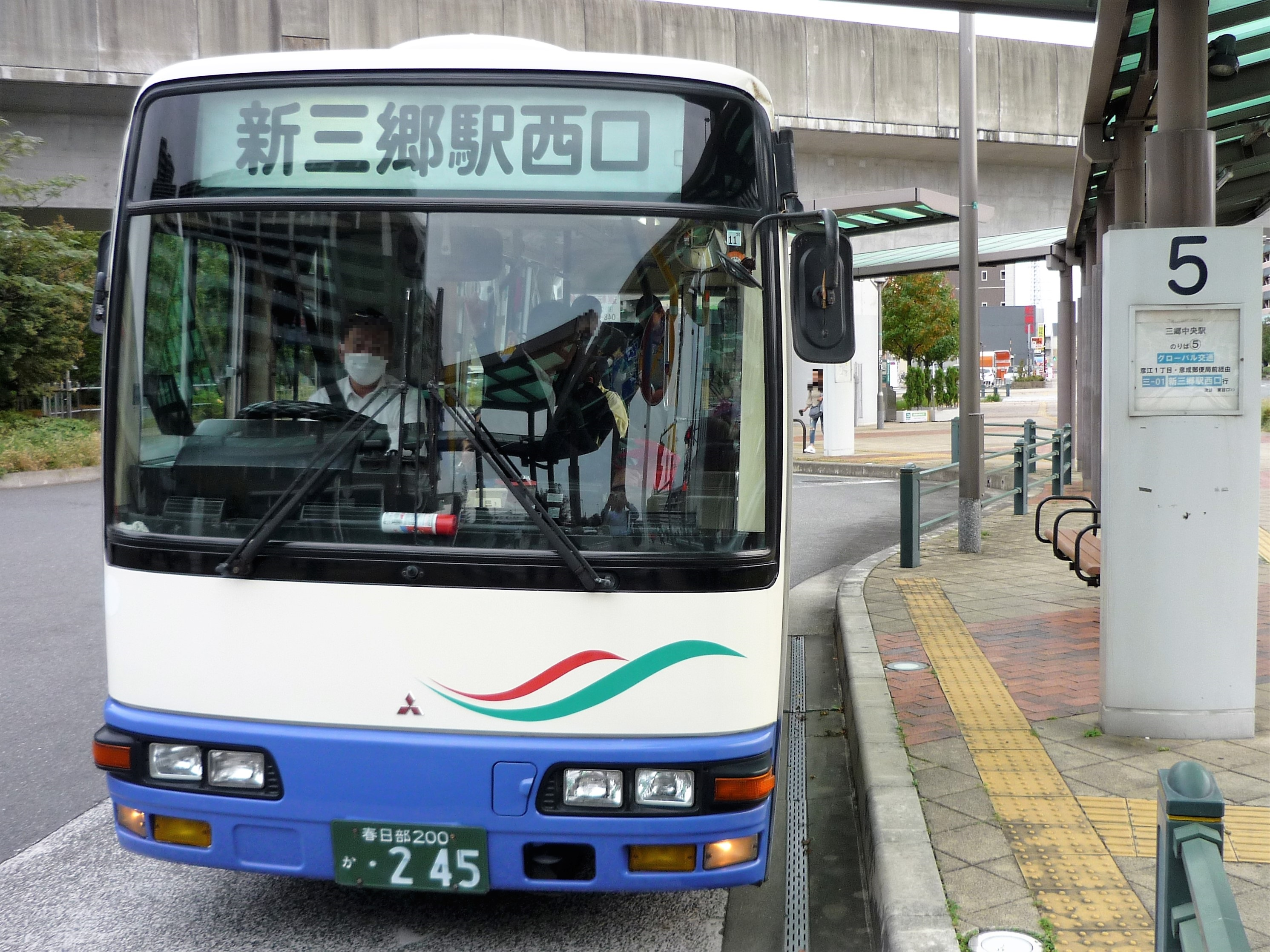 三郷中央駅5番乗り場に停車中のグローバル交通バス